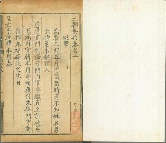 明天啟《三朝要典》書影